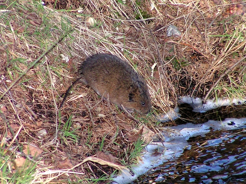 Arvicola terrestris (Ostschermaus; Erzgebirge, Germany)